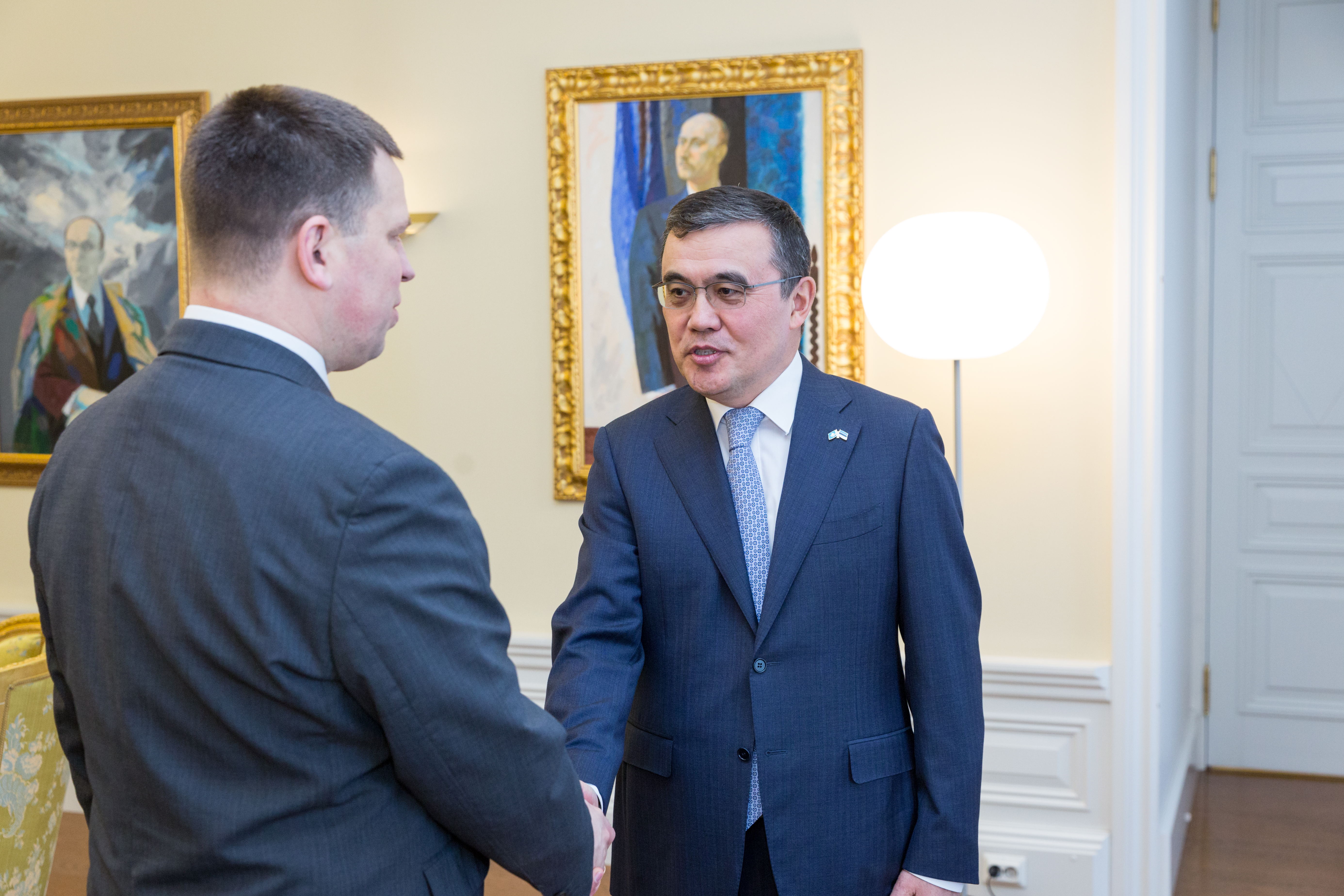 Nurlan Seitimov, Kasahstani suursaadik Eestis